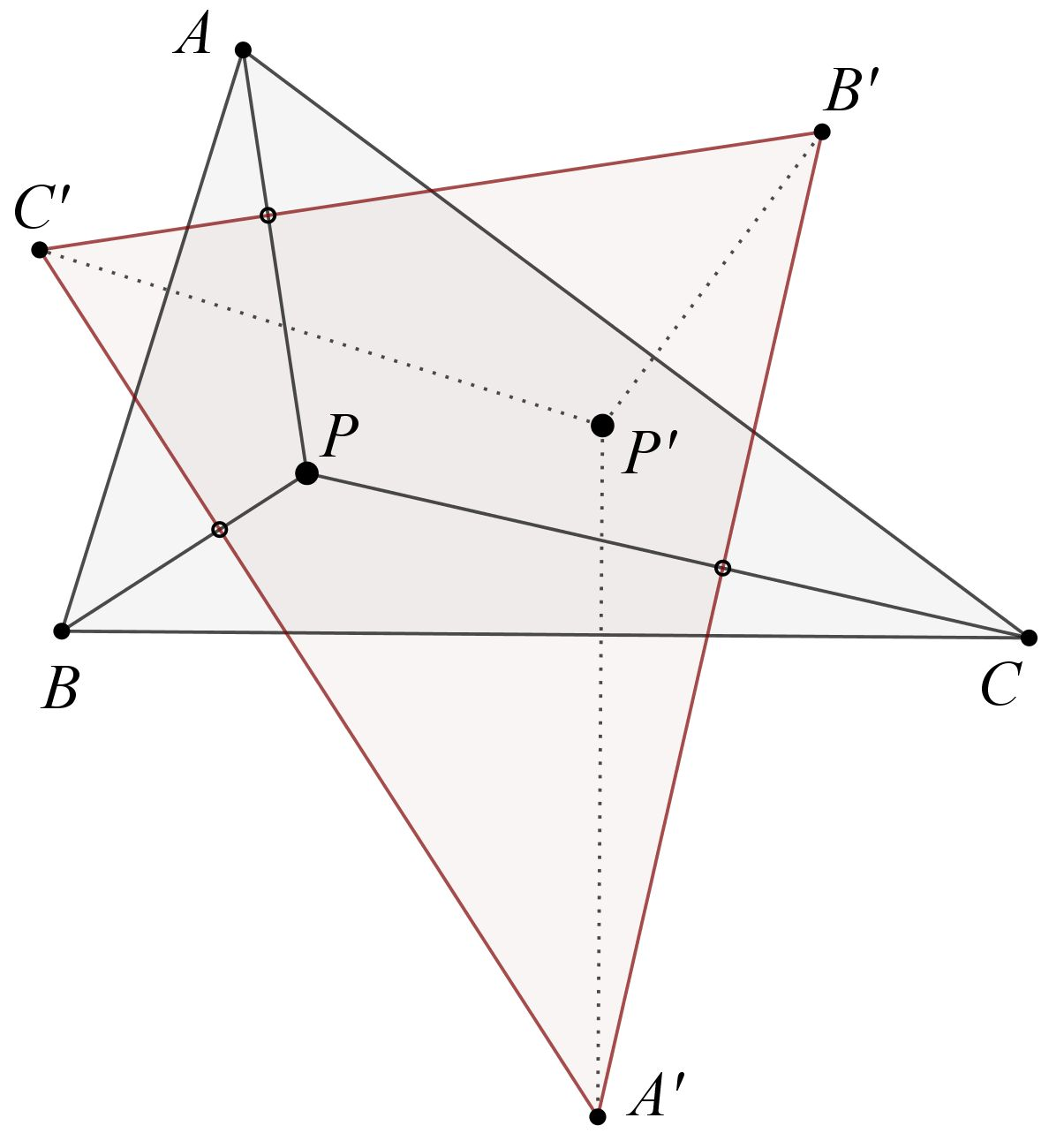 orthologe driehoeken (algemeen)